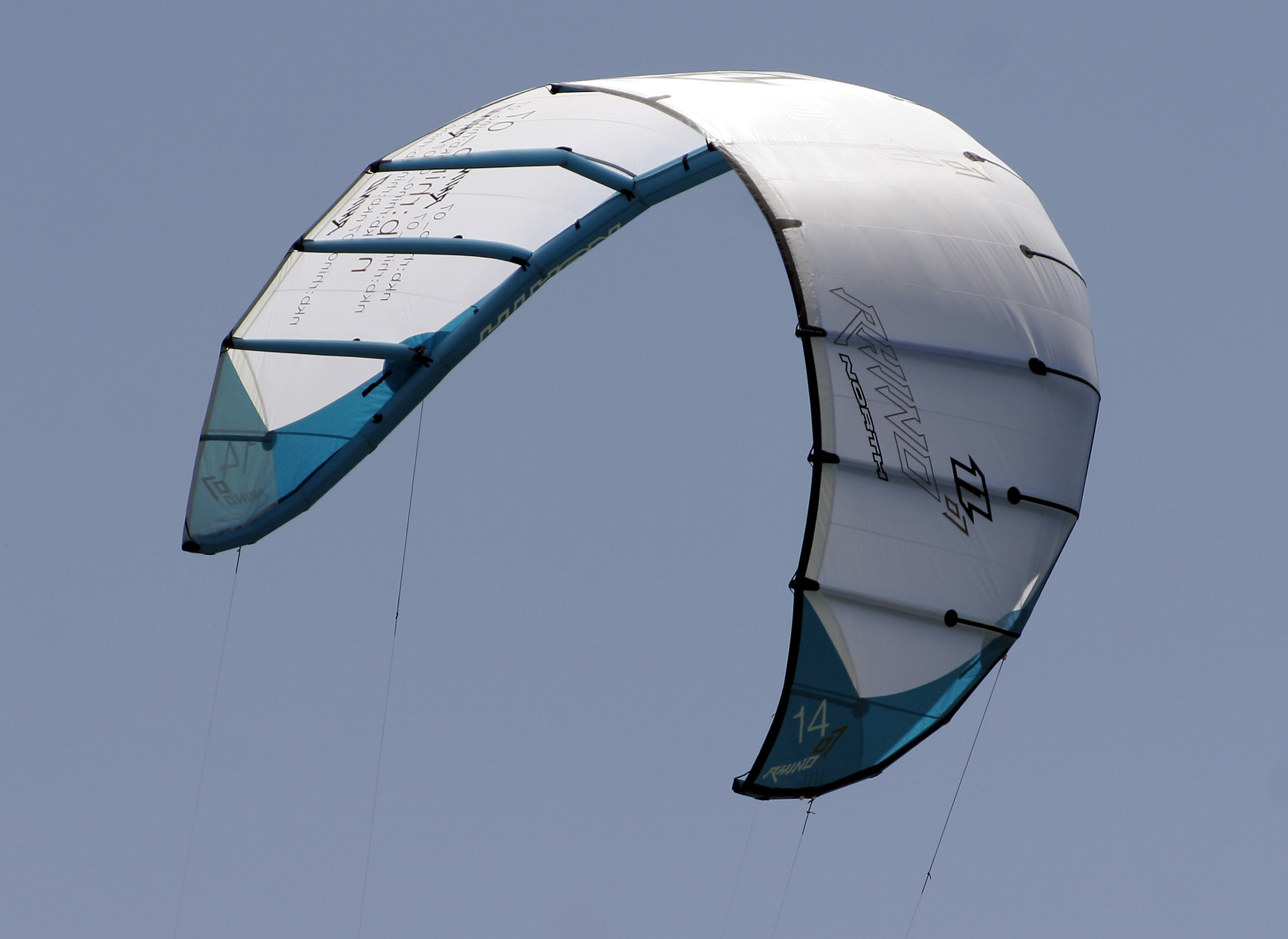 der Lenkdrachen für das Kitesurfen. Aufgenommen am Reschensee in Südtirol.